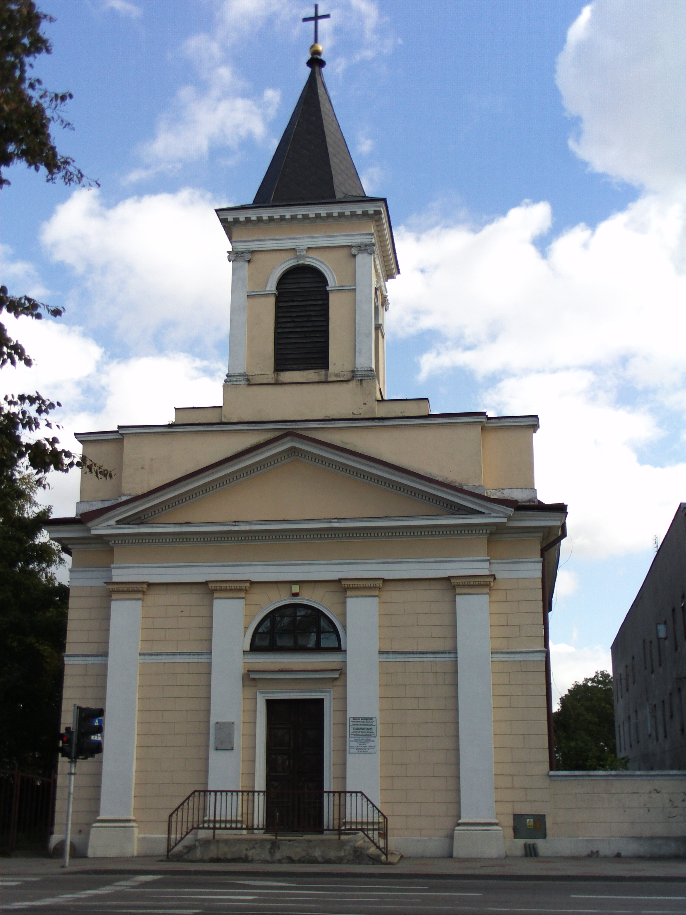 Kościół ewangelicki p.w. Świętej Trójcy